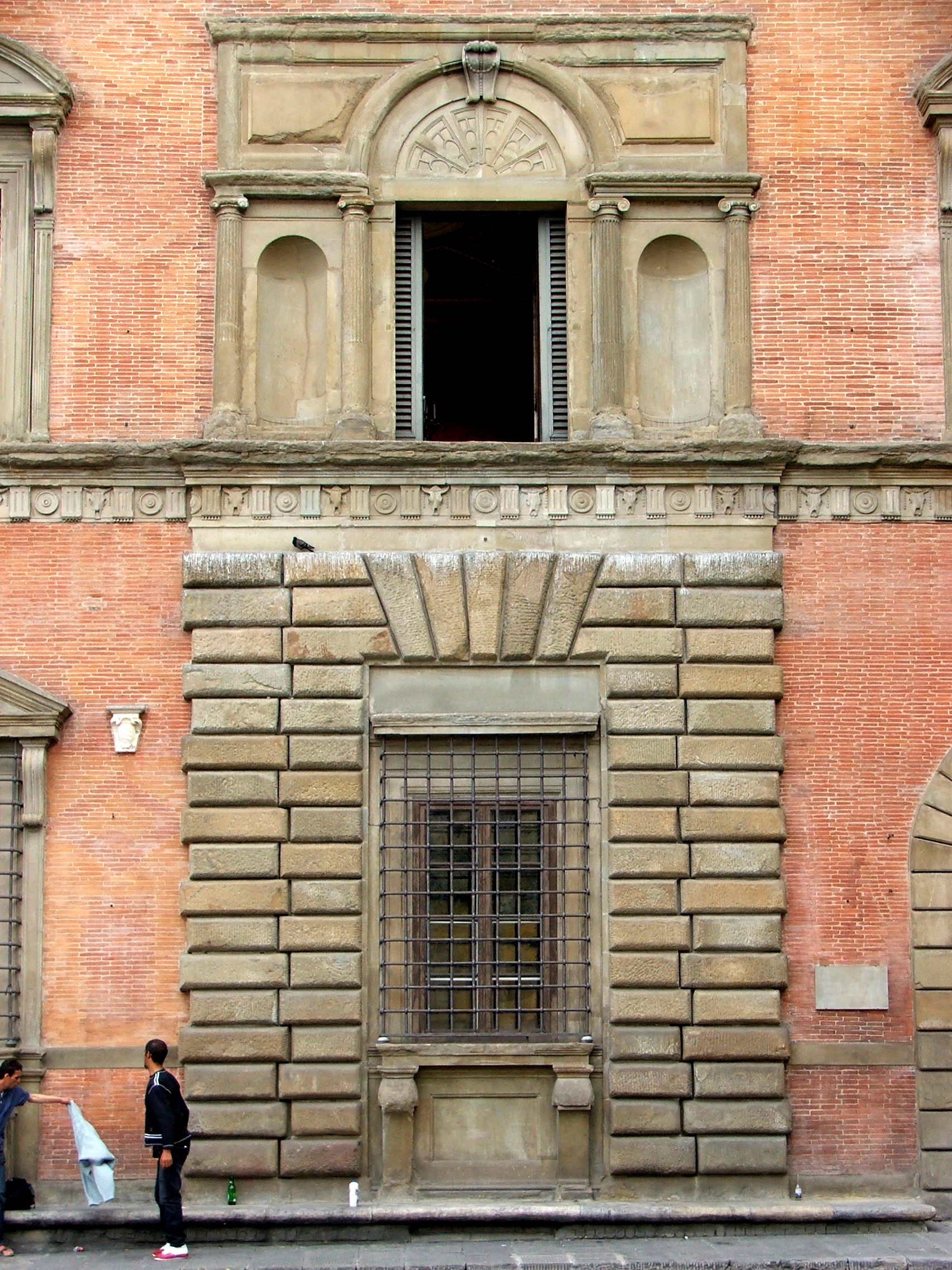 facciata di Palazzo Budini Gattai, visto da Piazza Santissima Annunziata, particolare della parte centrale